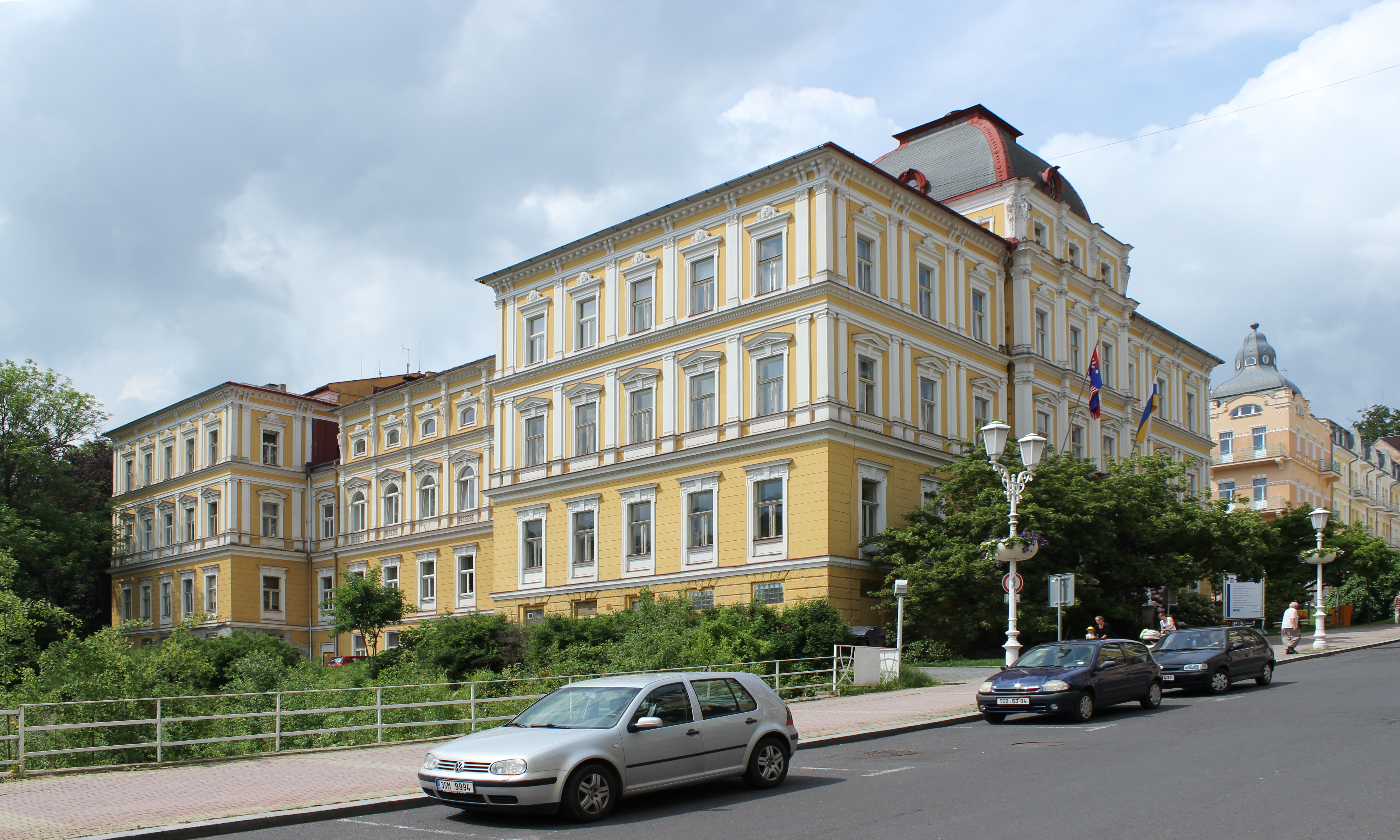 Budova mariánskolázeňského městského úřadu. This image was acquired during the event Wikiměsto Mariánské Lázně.